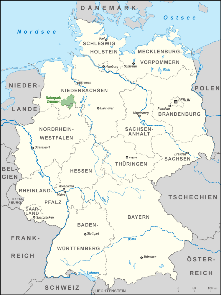 Karte des Naturparks Dümmer in Deutschland